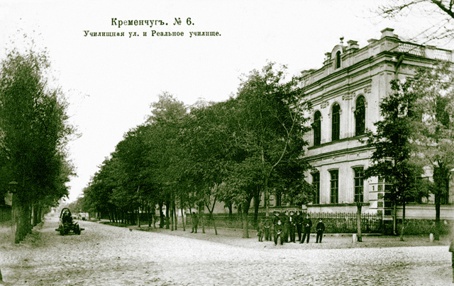 Postcards of old Kremenchuk. Реальне училище, вулиця Училищна, сучасна вулиця Коцюбинського.